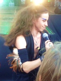 Michał Szpak, uczestnik polskiej wersji "X Factor", podczas koncertu finalistów w Galerii "Port Łódź" w Łodzi, 24 czerwca 2011